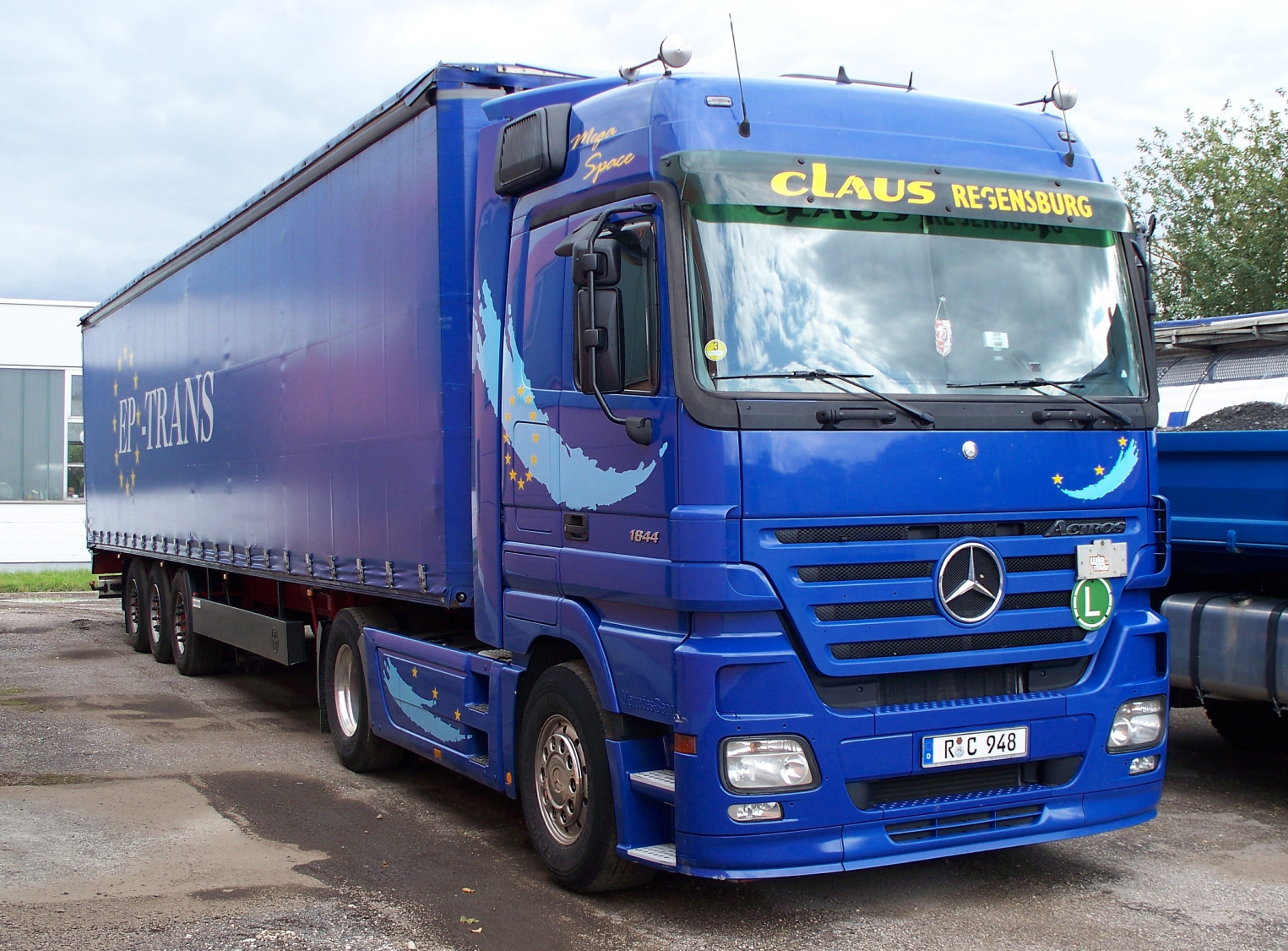 Blauer Mercedes-Benz Actros MP 2 Sattelschlepper.